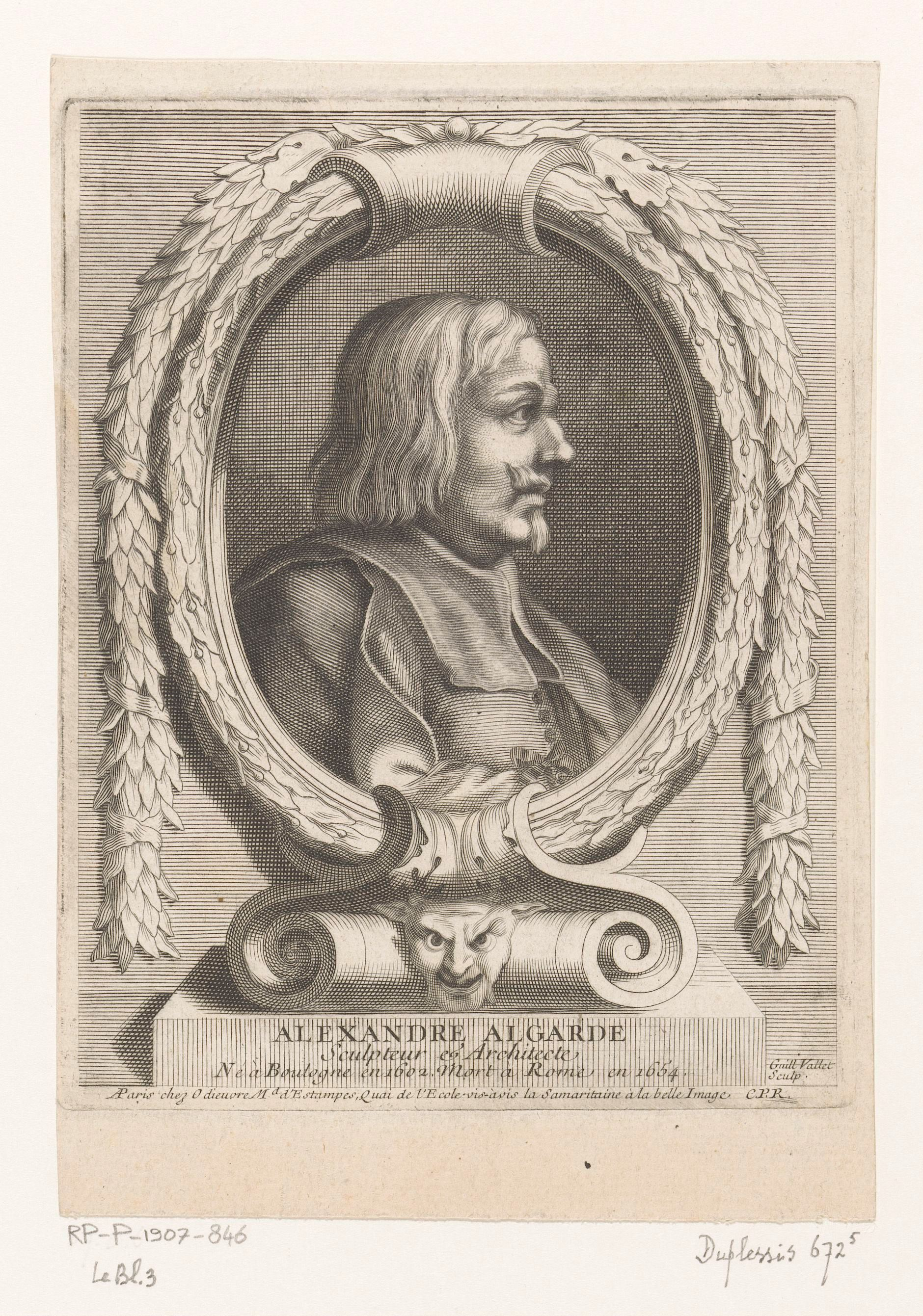 IdentificatieTitel(s): Portret van Alessandro Algardi in een ovale lijst gedecoreerd met een guirlandeAlexandre Algarde (...) (titel op object)Objecttype: prent Objectnummer: RP-P-1907-846Catalogusreferentie: LeBlanc 3Aantal staten bekend-2(2)Opschriften / Merken: verzamelaarsmerk, verso, gestempeld: Lugt 2228VervaardigingVervaardiger: prentmaker: Guillaume Vallet (vermeld op object)uitgever: Michel Odieuvre (vermeld op object)verlener van privilege: Franse kroon (vermeld op object)Plaats vervaardiging: prentmaker: Parijsuitgever: Parijsverlener van privilege: FrankrijkDatering: 1697 - 1704Materiaal: papier Techniek: graveren (drukprocedé) / stippelwerkAfmetingen: plaatrand: h 165 mm × b 129 mmOnderwerpWat: historical personsportrait, self-portrait of sculptorportrait, self-portrait of architectWie: Alessandro AlgardiVerwerving en rechtenVerwerving: aankoop 1905Copyright: Publiek domein